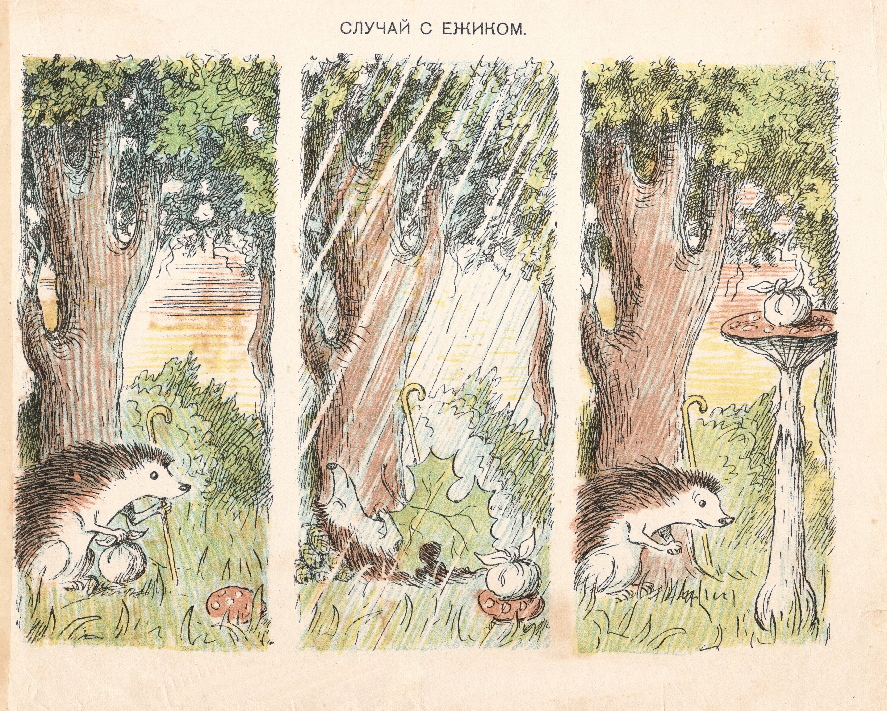 Рассказы в картинках. 1-е издание, Детиздат ЦК ВЛКСМ, Ленинград